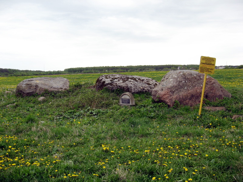 Тапілішкі. Група валуноў тапілішкінская